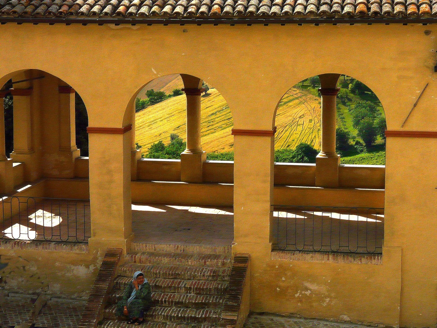 Loggetta rinascimentale